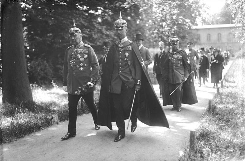 Der Ritterschlag des Johanniter-Ordens fand am 24. II. in der Friedenskirche in Potsdam unter dem Protektorat des Grossmeisters von Hindenburg statt. [Paul] v. Hindenburg (links) und Prinz Oskar von Preussen rechts begeben sich an der Spitze des Zuges zur Feier.